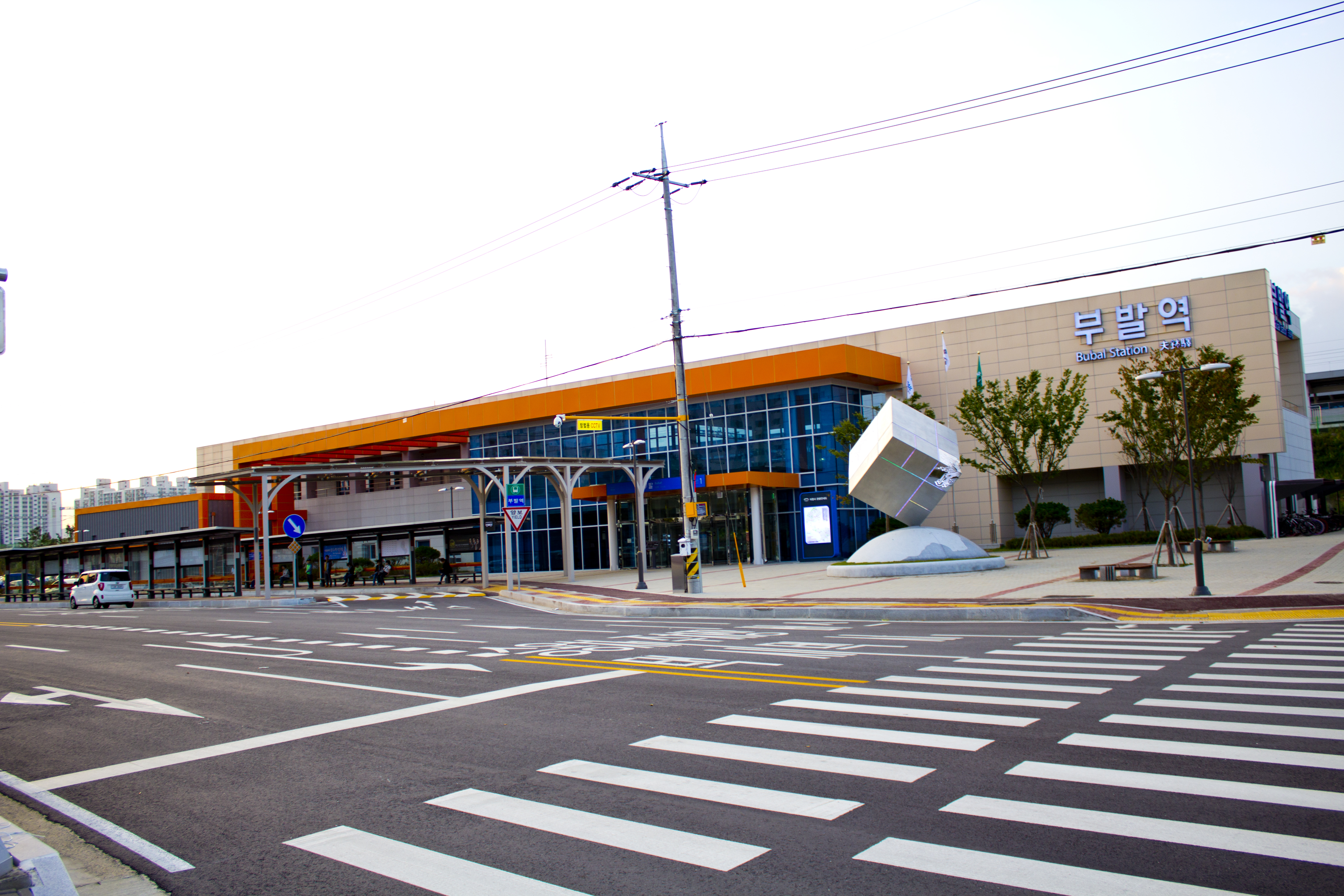 경강선 부발역 역사 전경